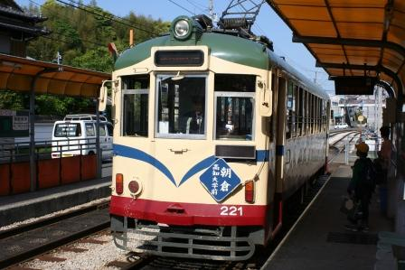 文殊通電停に進入する212